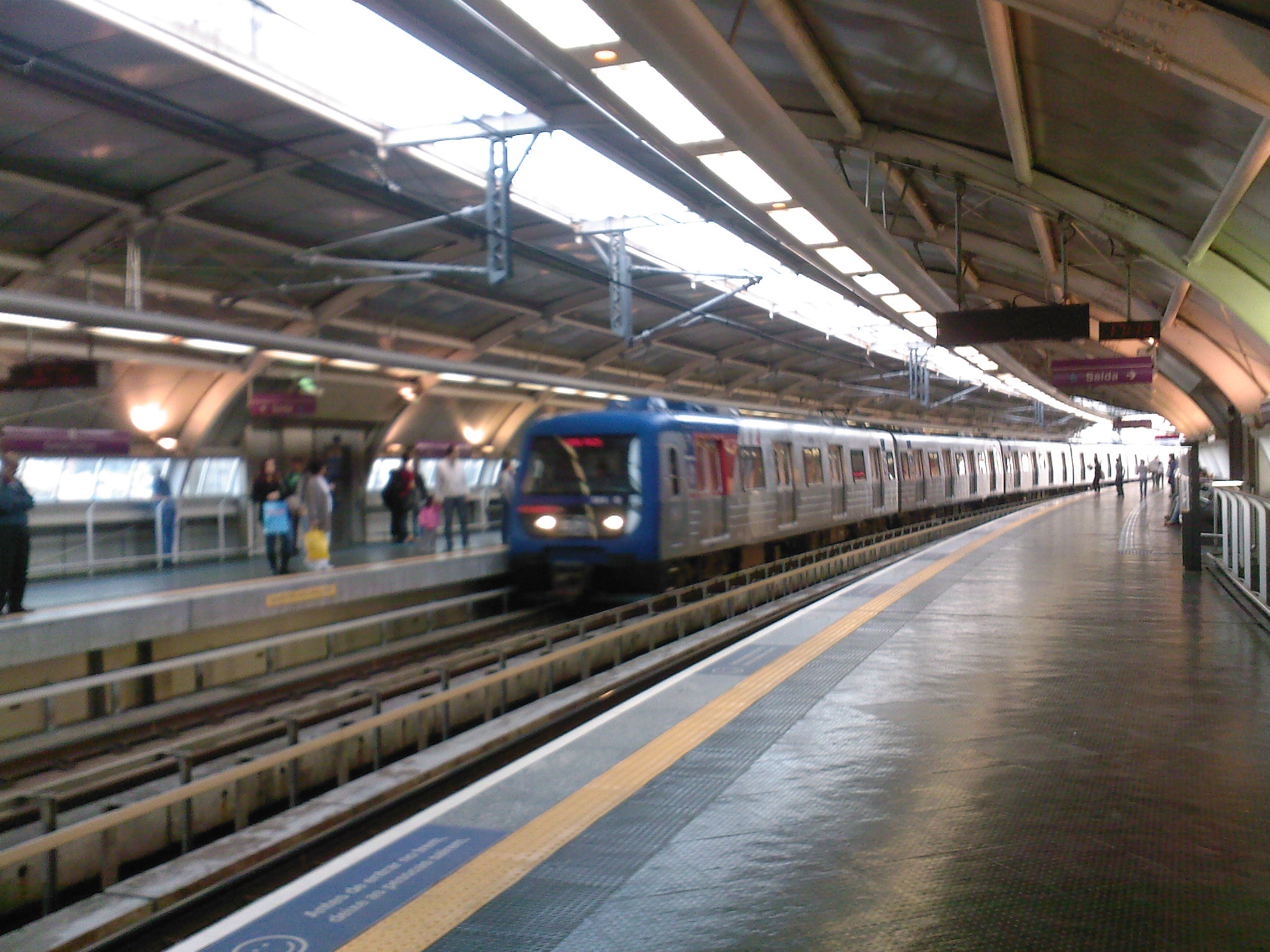 Metrô chegando na estação Campo Limpo